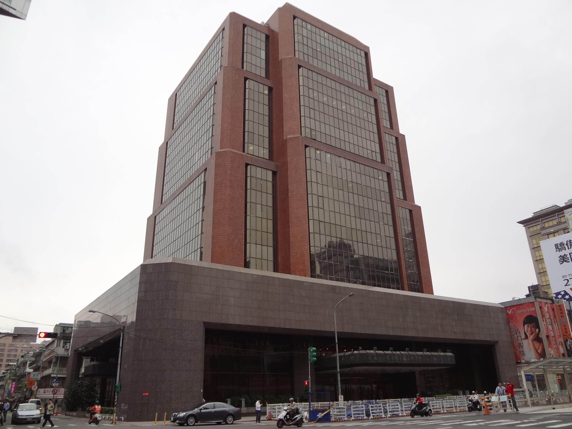 中華開發金融控股公司總部大樓。